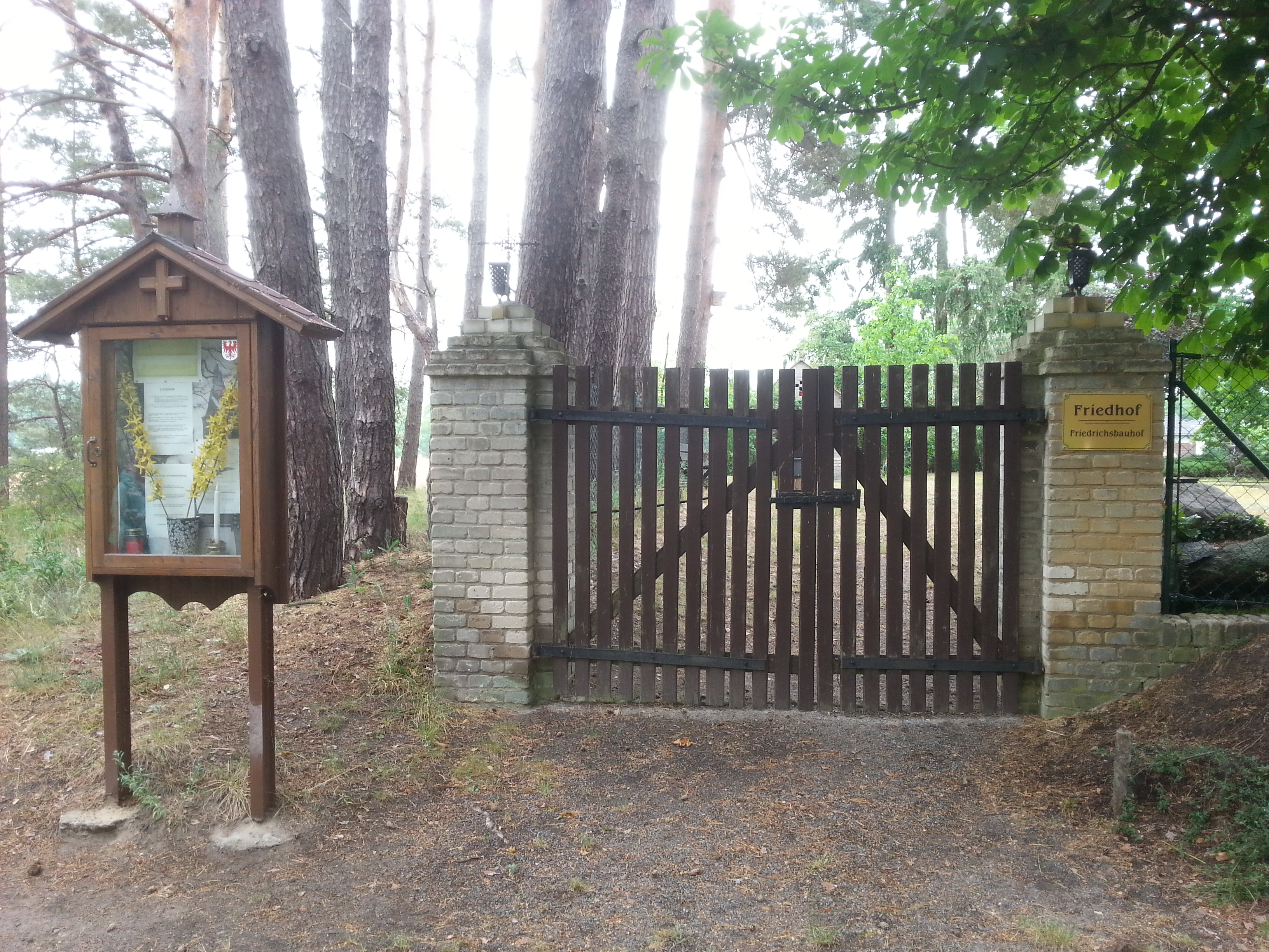 Friedrichsbauhof, Privatfriedhof